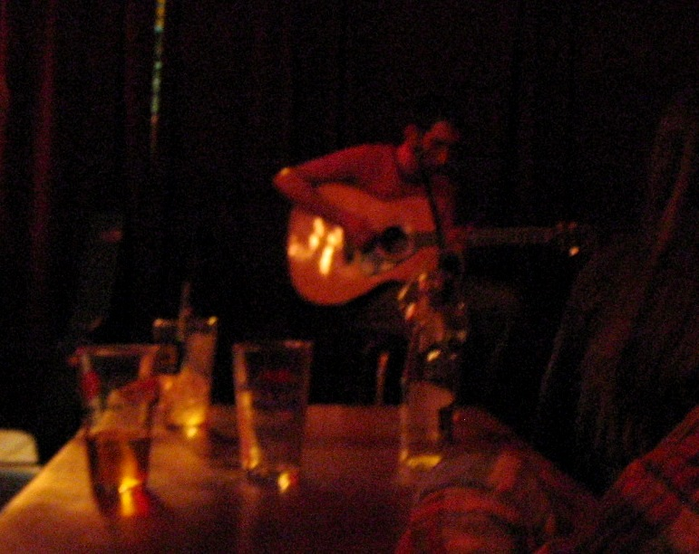 Soltero, live at Zuzu, Cambridge, MA, USA